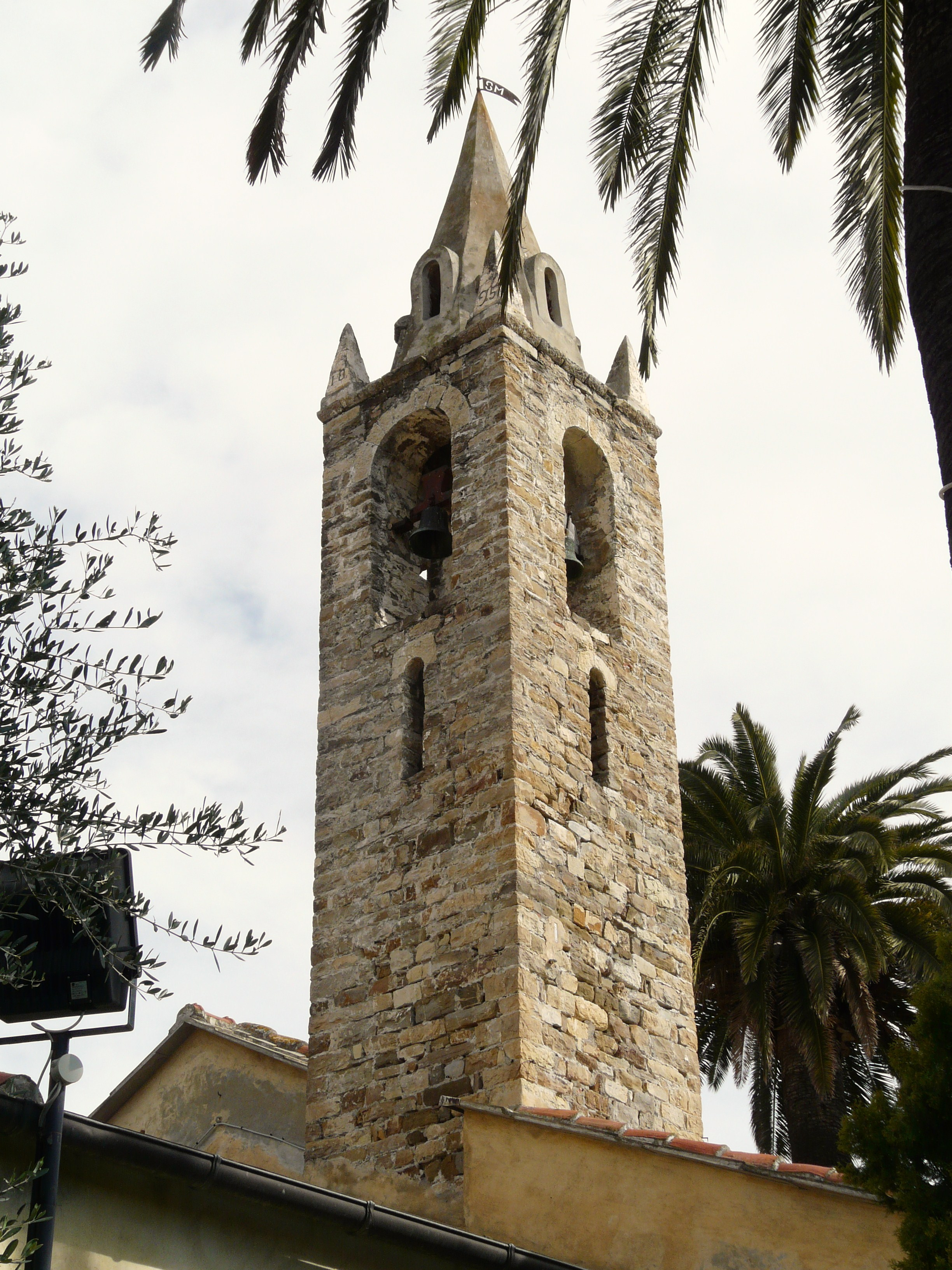 Santuario di Nostra Signora del Buon Consiglio di Riva Ligure, Liguria, Italia